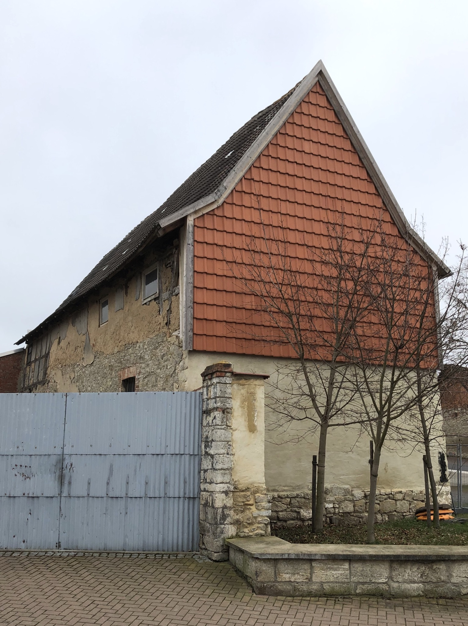 Rest Goldener Löwe in Hedersleben